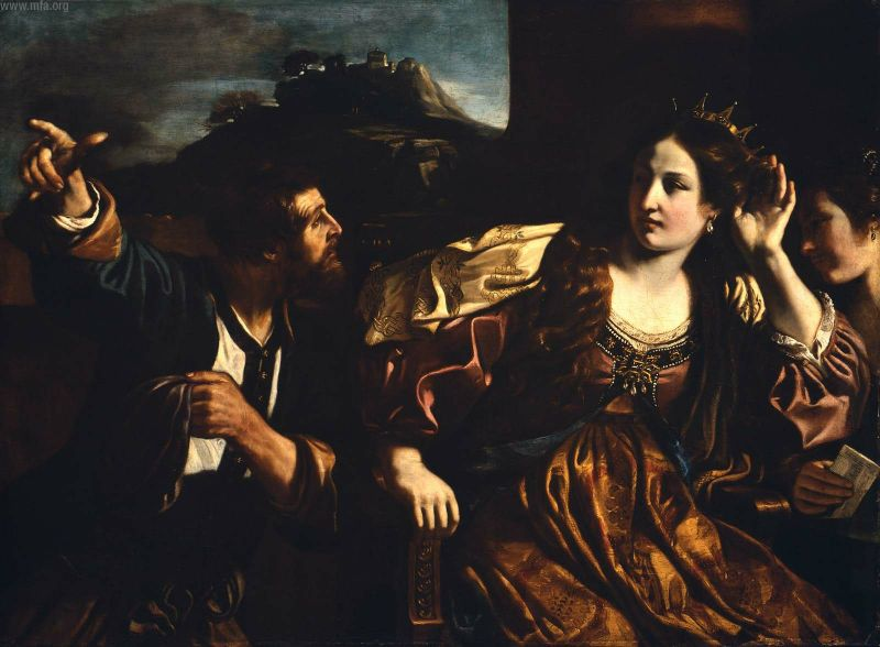 Semiramide riceve la notizia della rivolta di Babilonia, ol/tl, 112 x 155 cm, Museum of Fine Arts, Boston